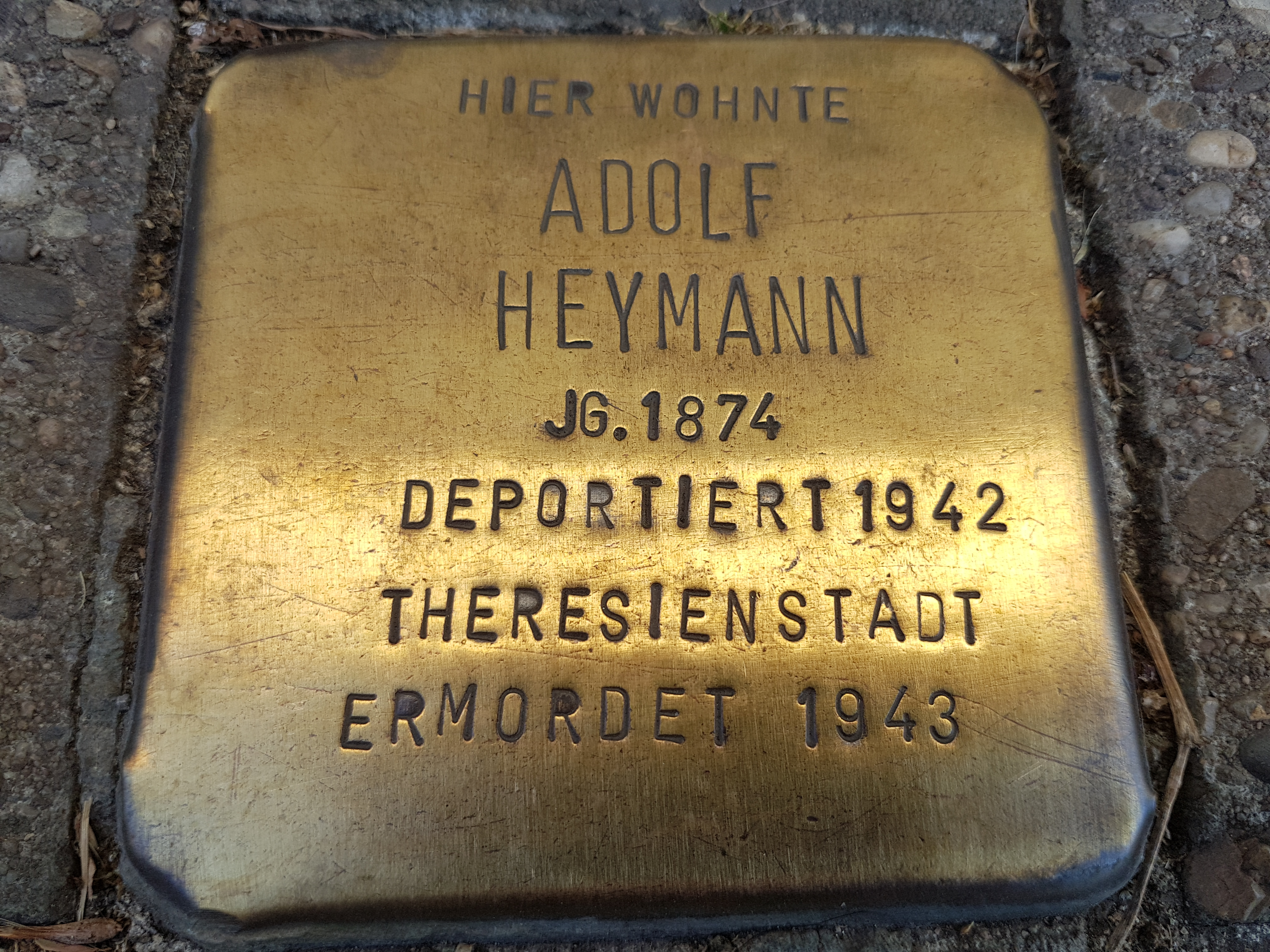 Stolperstein Duisburg Adolf Heymann